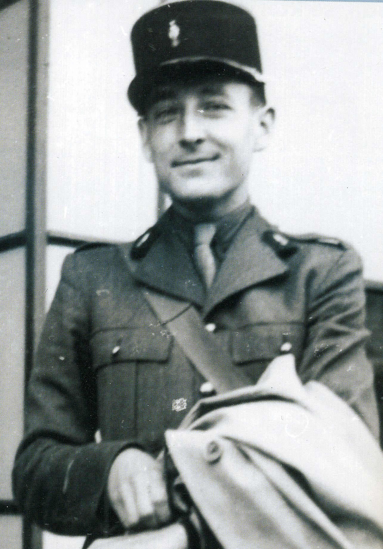 Španiel, Ivan, český důstojník